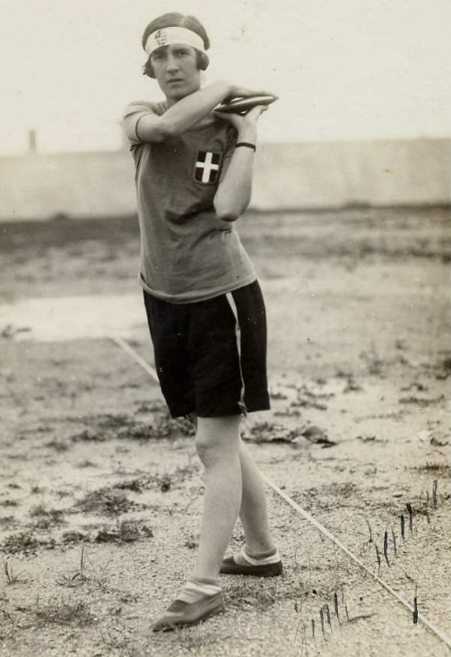 L'atleta italiana Lina Banzi